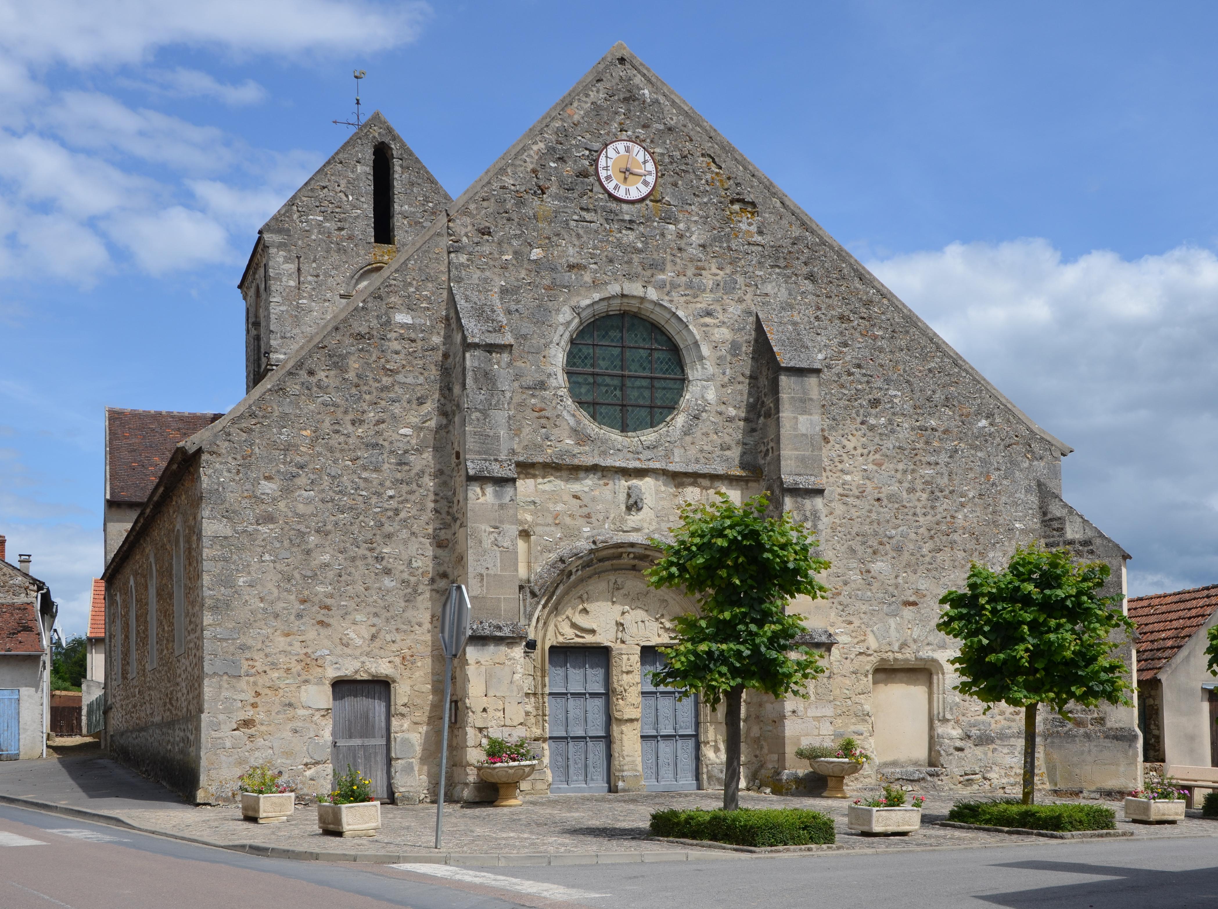 Église de Trélou-sur-Marne, Aisne, France